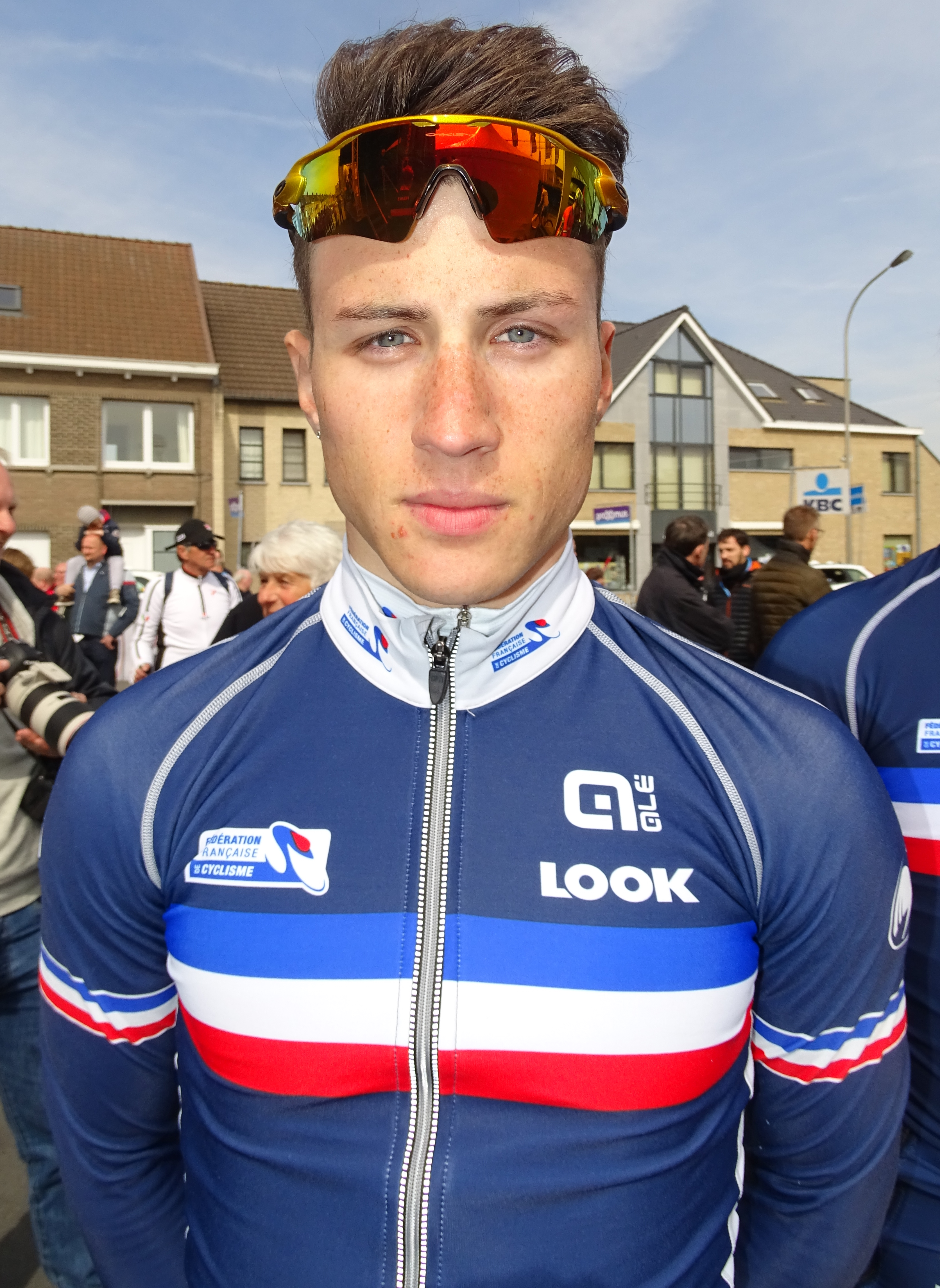 Reportage réalisé le samedi 9 avril à l'occasion du départ et de l'arrivée du Tour des Flandres espoirs 2016 à Audenarde, Belgique.